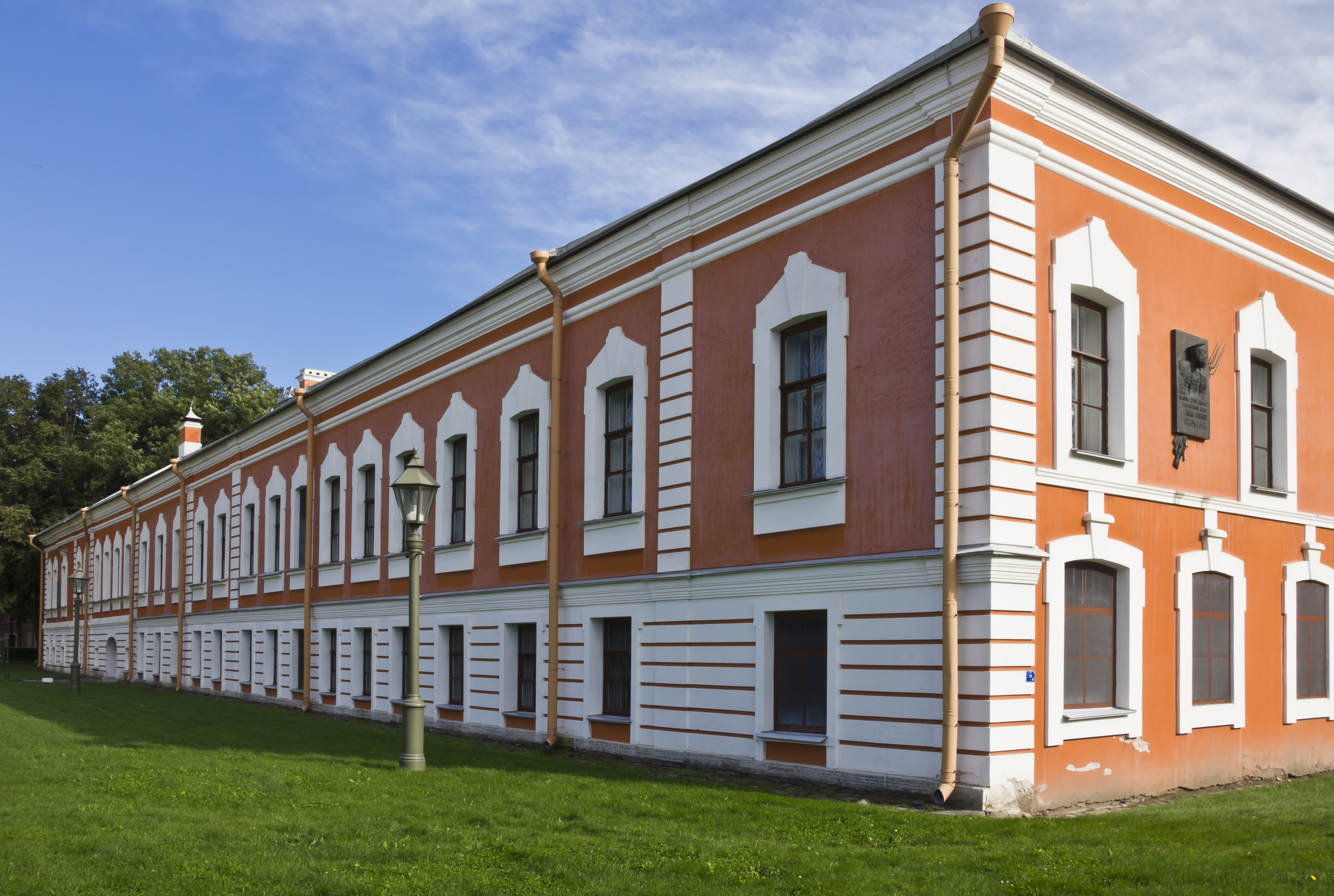 Петропавловская крепость.